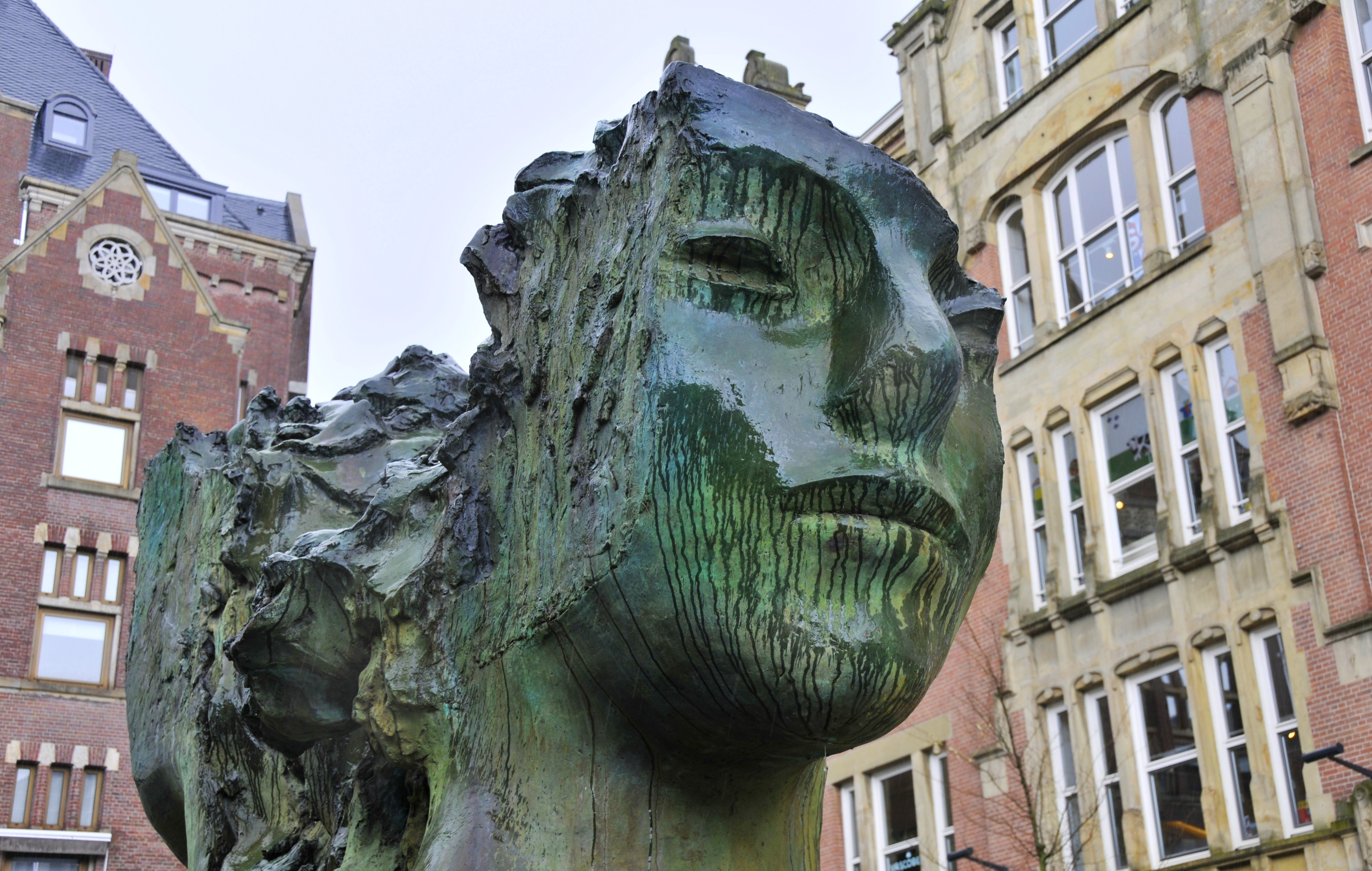 Beeld op het Rokin, het moet een fontein voorstellen maar in dit geval stroomt er gewoon regenwater overheen, de kleurverzadiging is verhoogd voor effet dramatique.